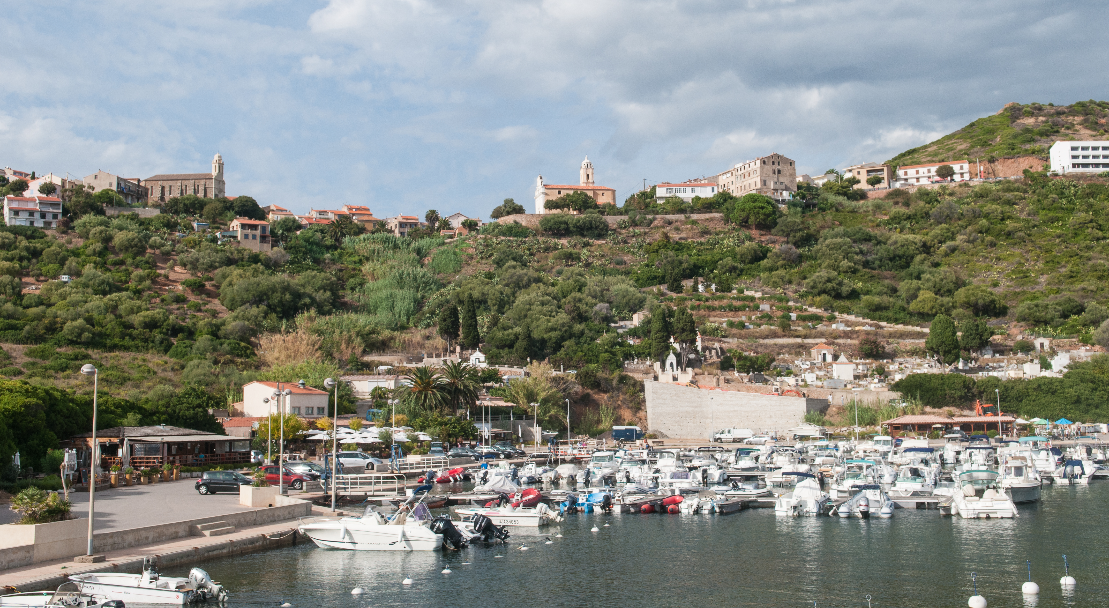 Cargèse, Corsica